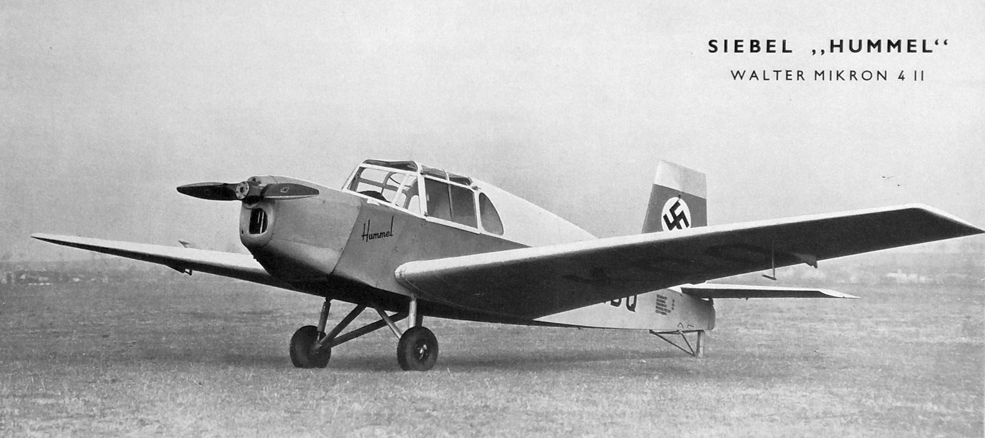 Walter Mikron II a Siebel Si 202 Hummel D-EKDQ (1938)